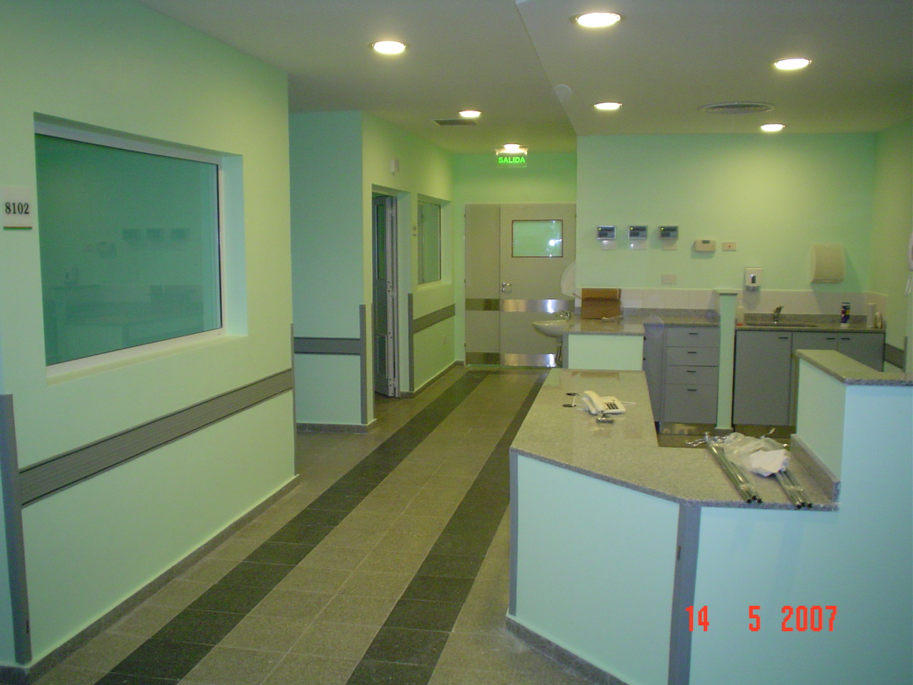 Recepción de los pacientes en un sector remodelado